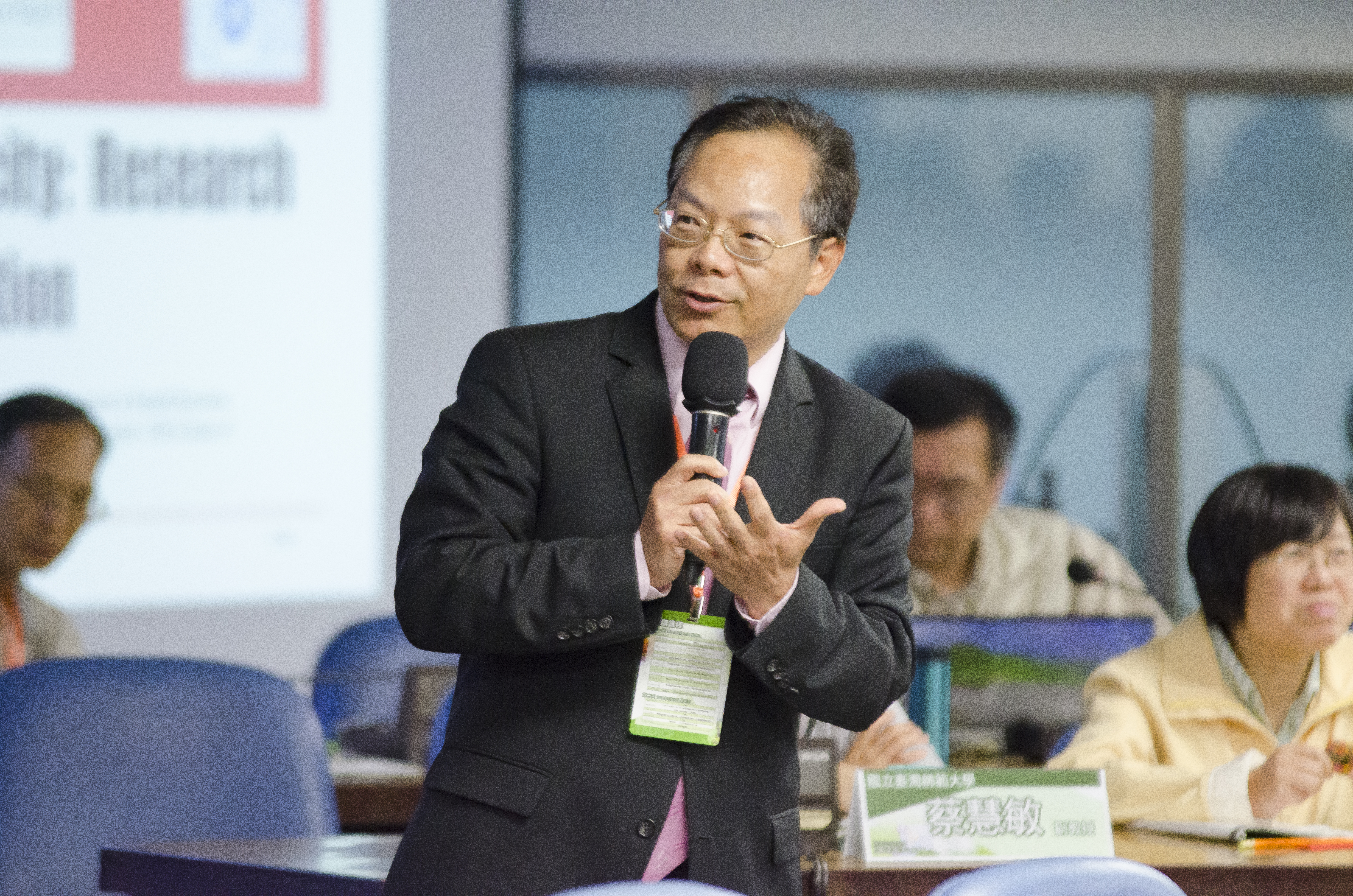 方偉達在2014年臺灣環境教育區域中心計畫跨域與增能國際研討會發言之畫面，該研討會於2014年4月15到16日於國立臺灣師範大學舉行。